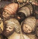 detail